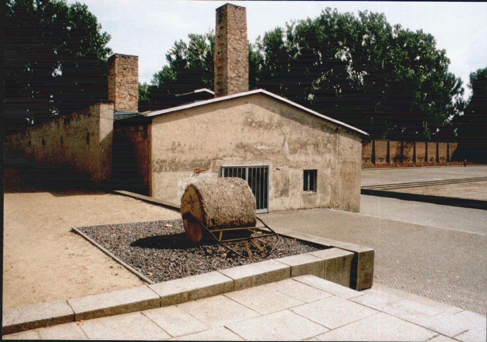 Mahn- und Gedenkstätte KZ Ravensbrück - Krematorium und Straßenwalze